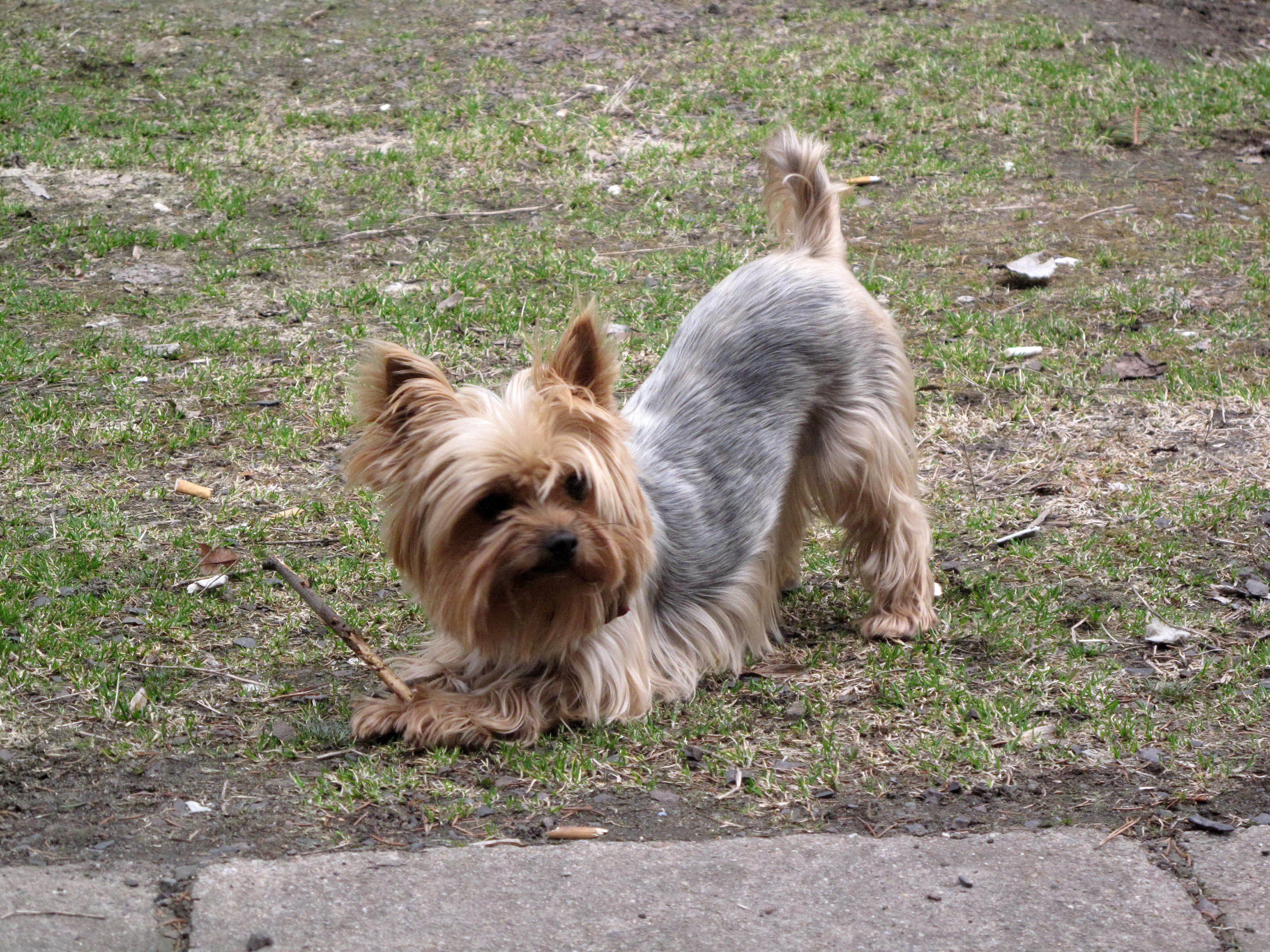 Yorkšírský teriér, fena mladšího věku